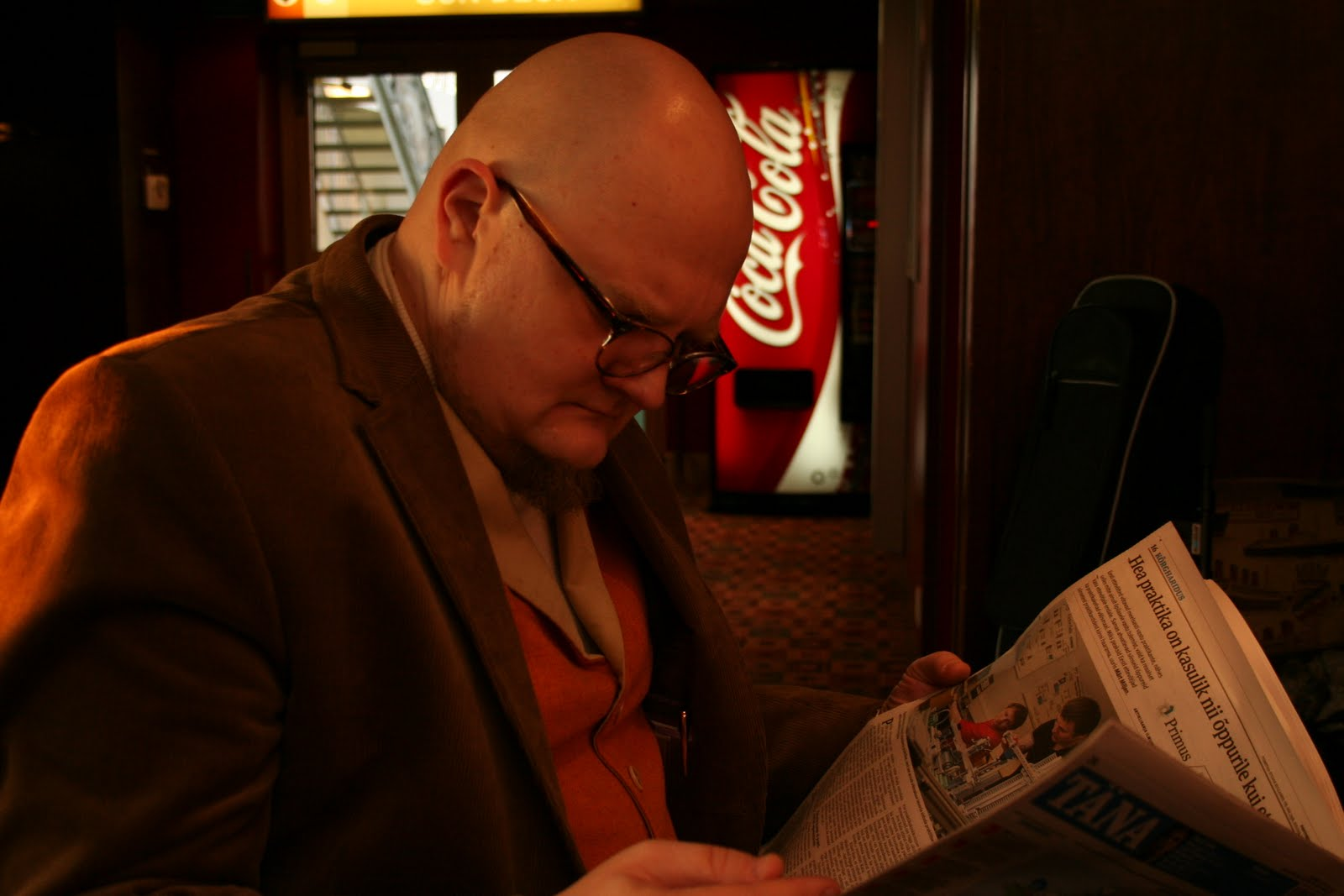 Karl Martin Sinijärv uurib, kas tema kirjutatud arvustusega on kõik kombes.